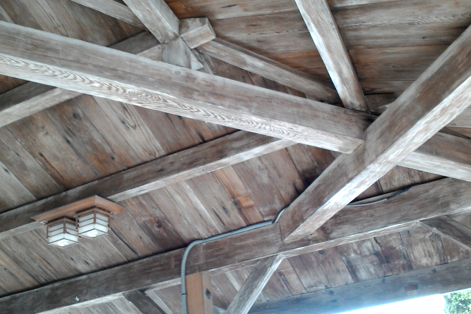 台鐵香山車站屋簷桁架,台灣省新竹市香山區香山聯里朝山里